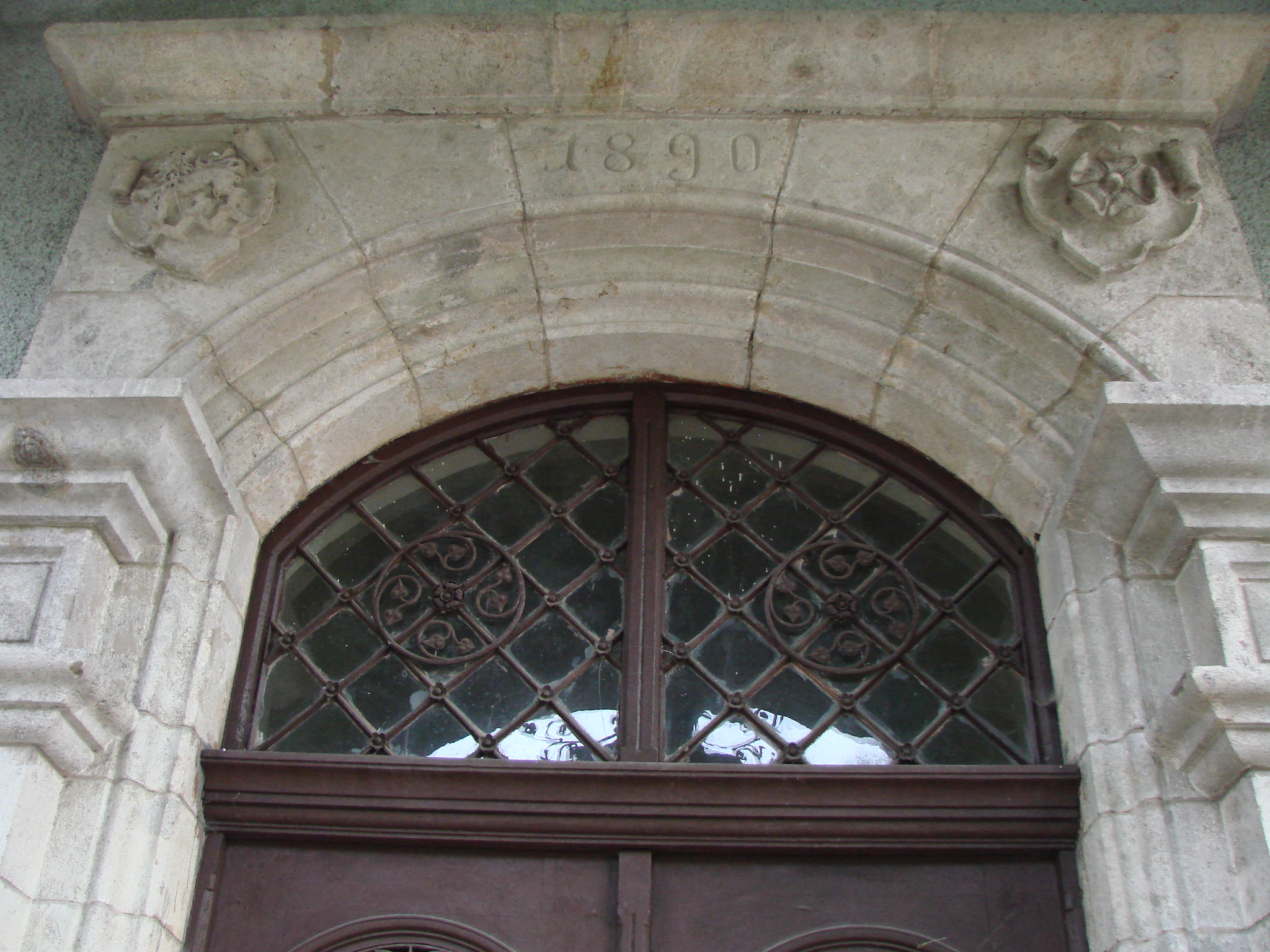 Дата початку спорудження палацу Шенборна